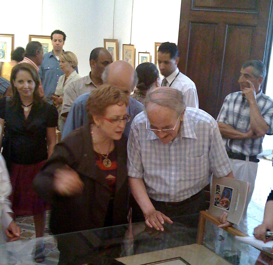 Mme Khalida Toumi, ministre de la culture, au vernissage de l'exposition consacrée à Bachir Yellès